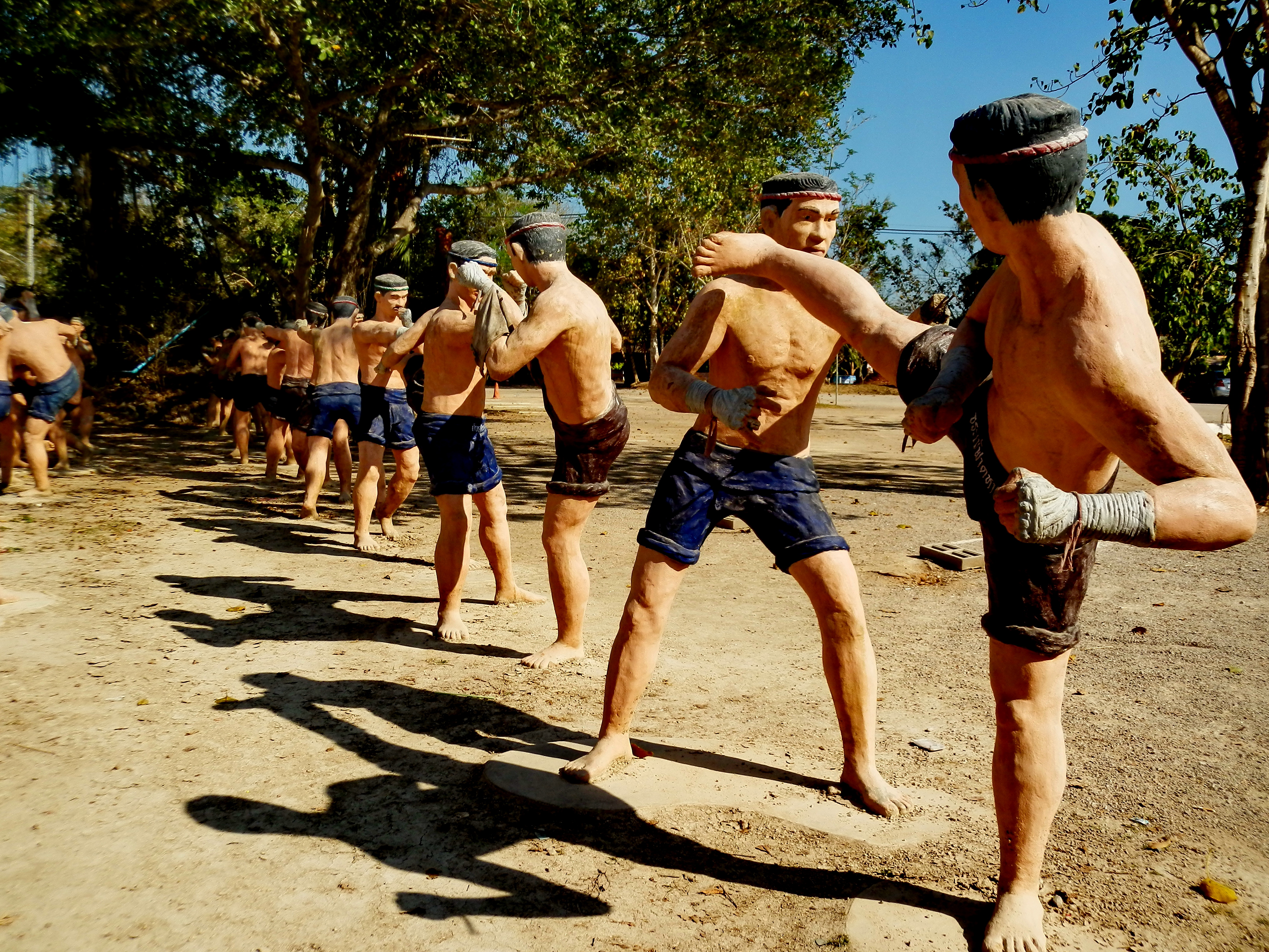 วัดบางกุ้ง เป็นวัดเก่าแก่ตั้งอยู่ในเขตตำบลบางกุ้ง อำเภอบางคนที จังหวัดสมุทรสงคราม ตามประวัติกล่าวว่าสร้างขึ้นตั้งแต่สมัยกรุงศรีอยุธยาเป็นวัดสำคัญวัดหนึ่งทางประวัติศาสตร์ เนื่องจากในสมัยกรุงศรีอยุธยาตอนปลาย ปีพ.ศ. ๒๓๐๘ กองทัพพม่ายกเข้ามาตีกรุงศรีอยุธยา สมเด็จพระเจ้าเอกทัศน์จึงมีพระราชดำรัสสั่งให้หัวเมืองปากใต้ยกกองทัพเรือมาตั้งค่ายสร้างกำแพงล้อมวัดบางกุ้งที่ตำบลบางกุ้ง เมืองสมุทรสงคราม เรียกว่า “ค่ายบางกุ้ง” กองทัพพม่าซึ่งยกทัพเข้ามาตามลำน้ำแม่กลองและบุกลงมาจนถึงค่ายบางกุ้ง โดยที่กองทัพของกรุงศรีอยุธยาไม่สามารถต้านทานไว้ได้ค่ายบางกุ้งจึงแตก หลังจากพม่าตีกรุงศรีอยุธยาแตกในปี พ.ศ. ๒๓๑๐ ค่ายบางกุ้งก็ตกอยู่ในสภาพค่ายร้าง เมื่อสมเด็จพระเจ้าตากสินมหาราชสถาปนากรุงธนบุรีแล้ว โปรดให้ชาวจีนรวบรวมสมัครพรรคพวกมาตั้งเป็นกองทหารรักษาค่ายเก่าที่บางกุ้ง จึงเรียกกันอีกชื่อหนึ่งว่า “ค่ายจีนบางกุ้ง” ในปี พ.ศ. ๒๓๑๑ หลังจากเสียกรุงศรีอยุธยาไปประมาณ ๘ เดือน กองทัพพม่านำโดยเจ้าเมืองทวายยกทัพบกและทัพเรือลงมาล้อมค่ายจีนบางกุ้งไว้ ทหารจีนที่รักษาค่ายบางกุ้งสู้รบอย่างเต็มที่แต่มีกำลังน้อยกว่าเกือบจะเสียค่ายแก่พม่า กรมการเมืองสมุทรสงครามจึงมีหนังสือกราบทูลไปยังกรุงธนบุรี สมเด็จพระเจ้าตากสินทรงทราบจึงยกกองทัพมาตีทัพพม่าแตกพ่ายไป และต่อมาในปี พ.ศ. ๒๓๑๗ สมเด็จพระเจ้าตากสินมหาราชยกกองทัพเรือนำทหารไปออกศึกที่บางแก้ว เมืองราชบุรี ในระหว่างการเดินทางได้หยุดกองทัพพักพลเสวยพระกระยาหารที่วัดกลางค่ายบางกุ้ง